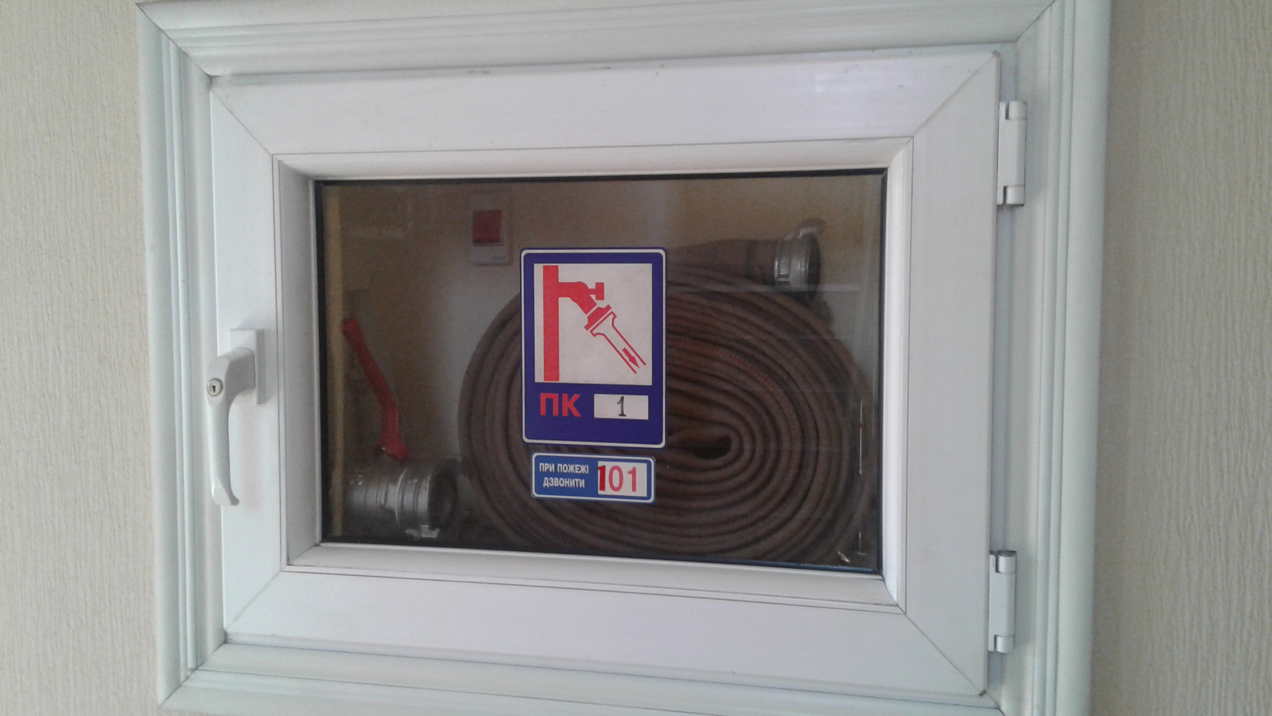 Знімок 2017, а шафу зроблено 2006 року